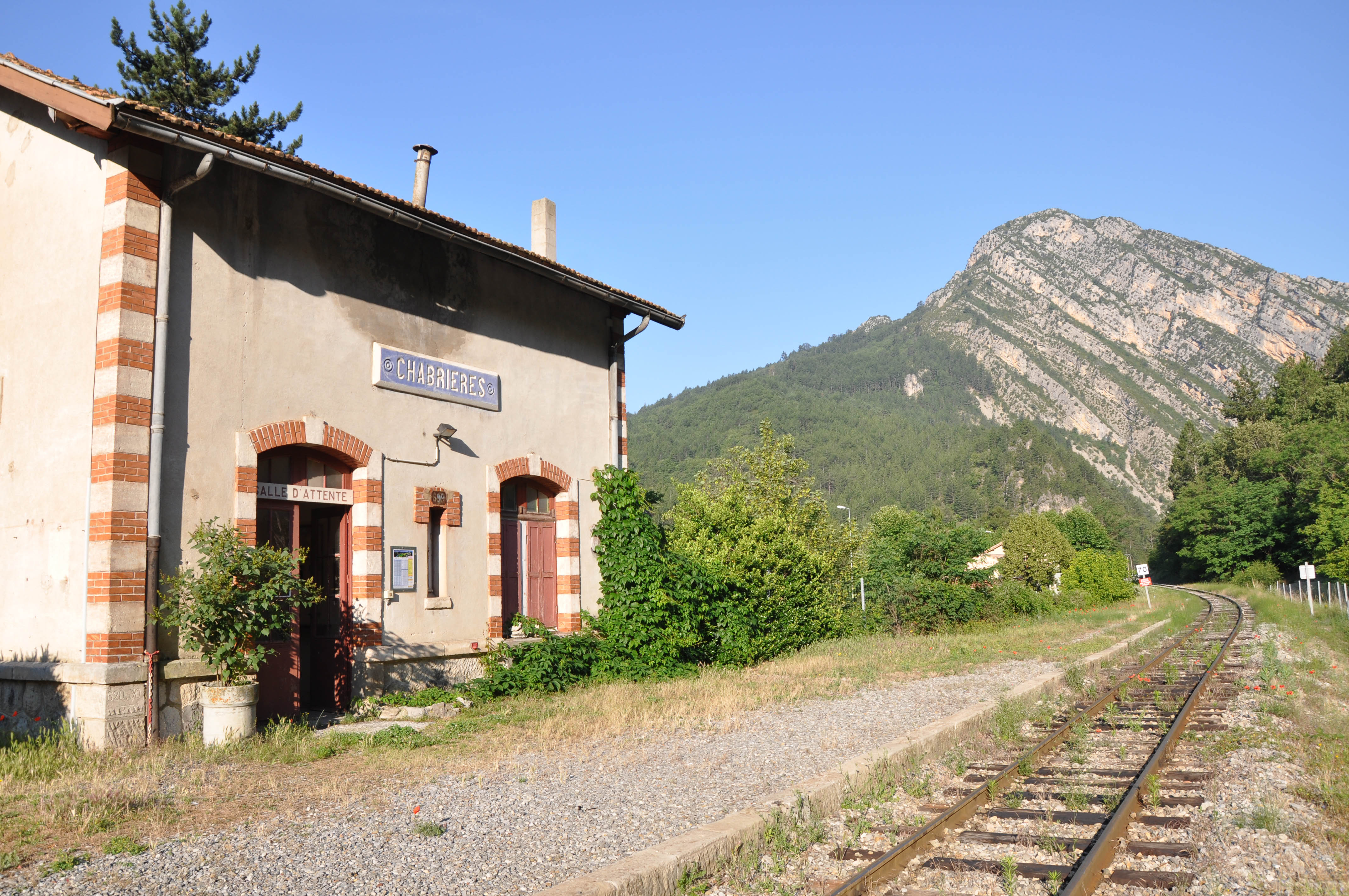 Gare de Chabrières à Entrages